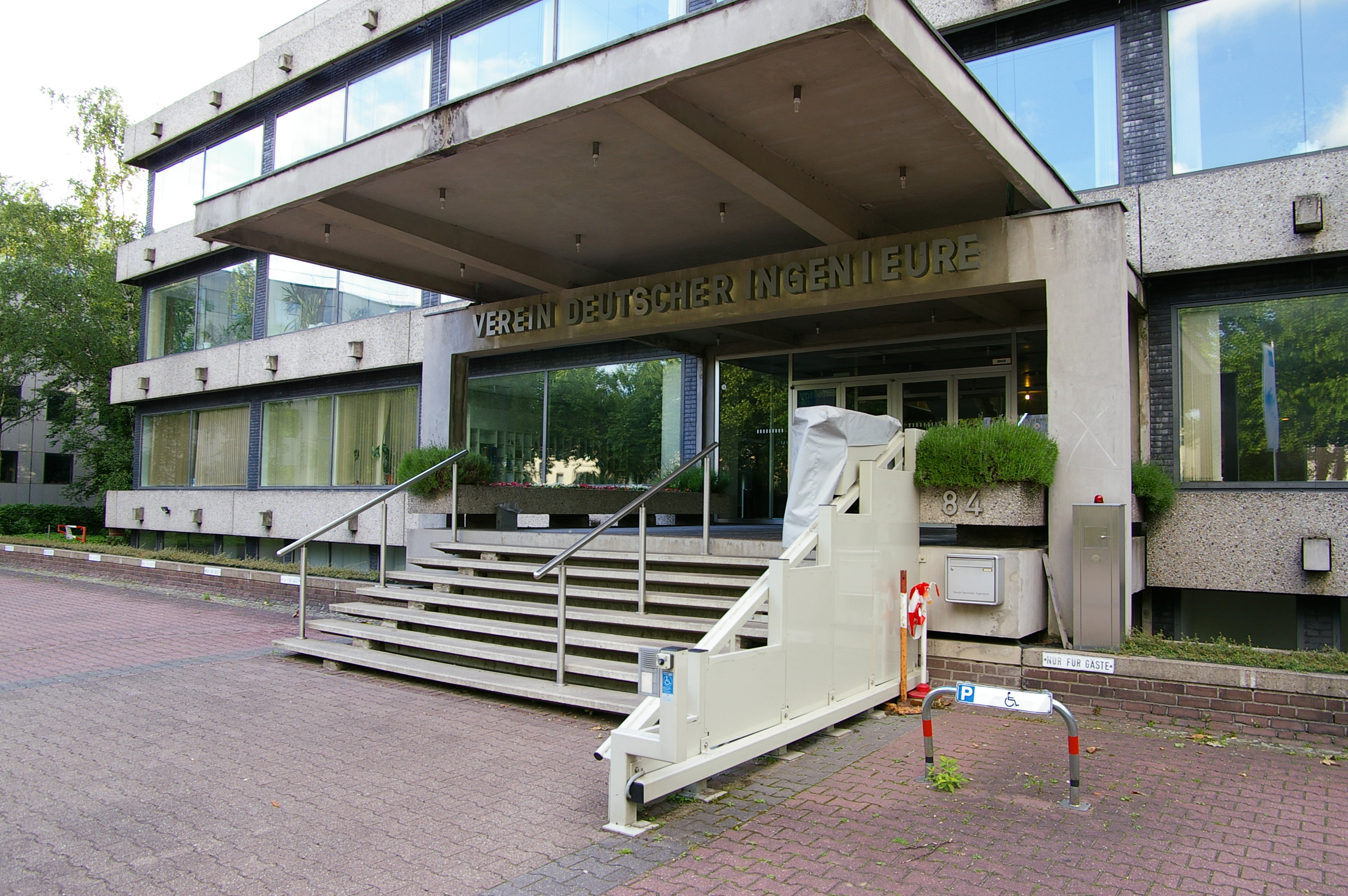 Genehmigung: GFDL (Version 1.2, November 2002), kein wie auch immer geartetes "Gentlemen-Agreement". Bildnutzung ohne Einhaltung der Bestimmungen der GFDL ist kostenpflichtig und wird vom Rechteinhaber in Rechnung gestellt. Zweitlizensierung ggf. auch unentgeltlich auf Anfrage. Es gelten die AGB. VDI Düsseldorf